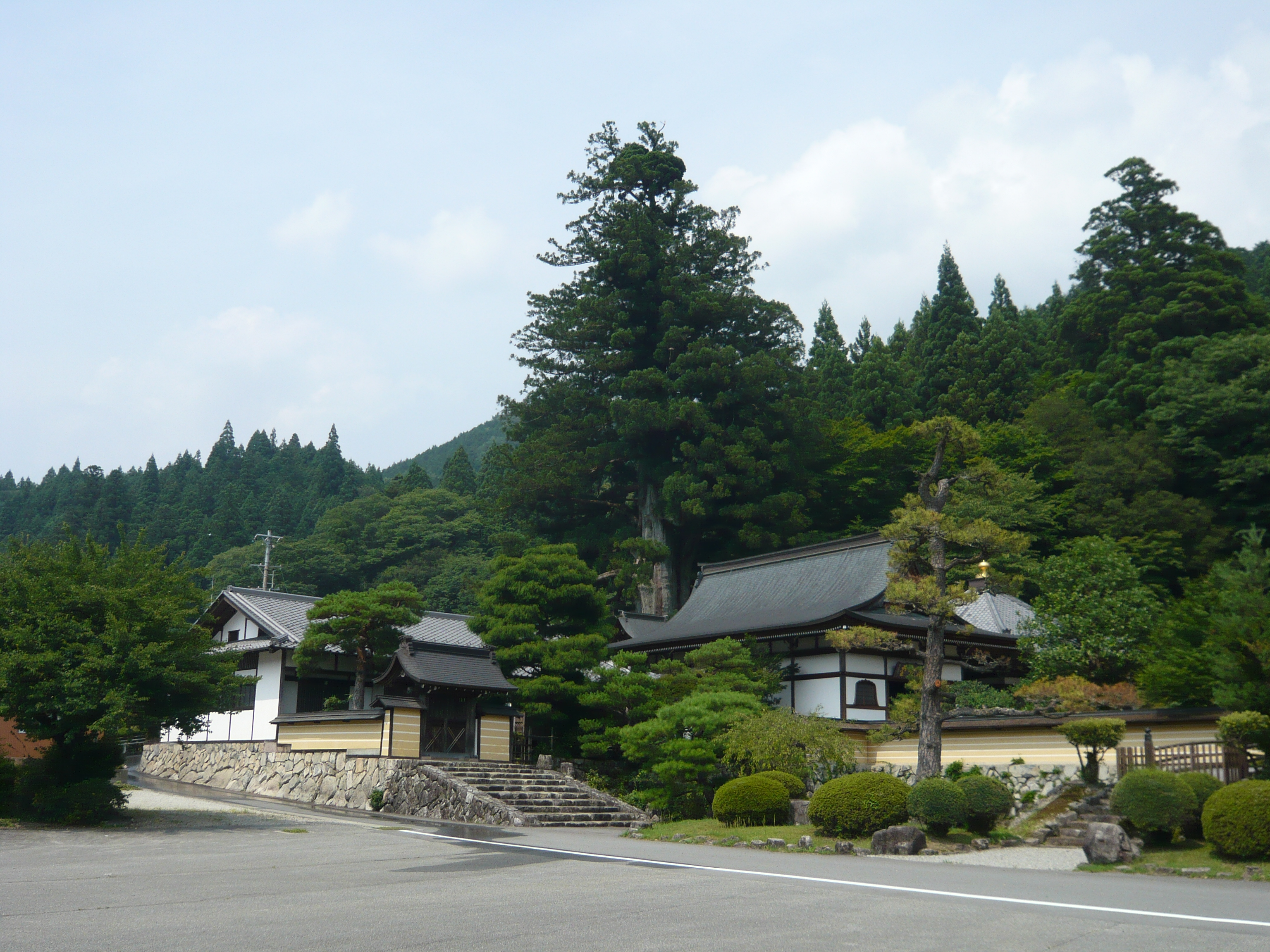 下呂市萩原町中呂の禅昌寺。大杉を望む。